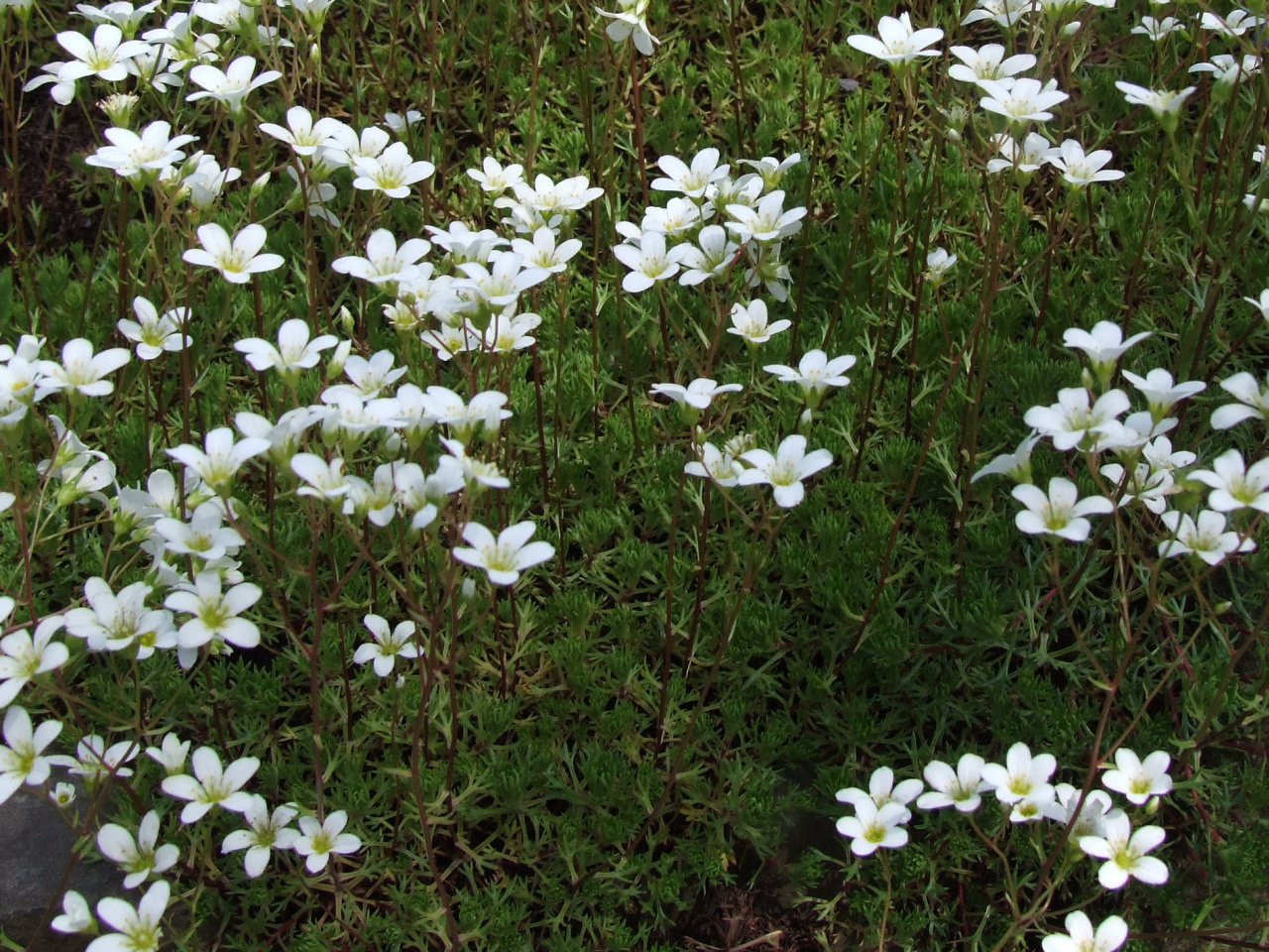 Saxifraga trifurcata